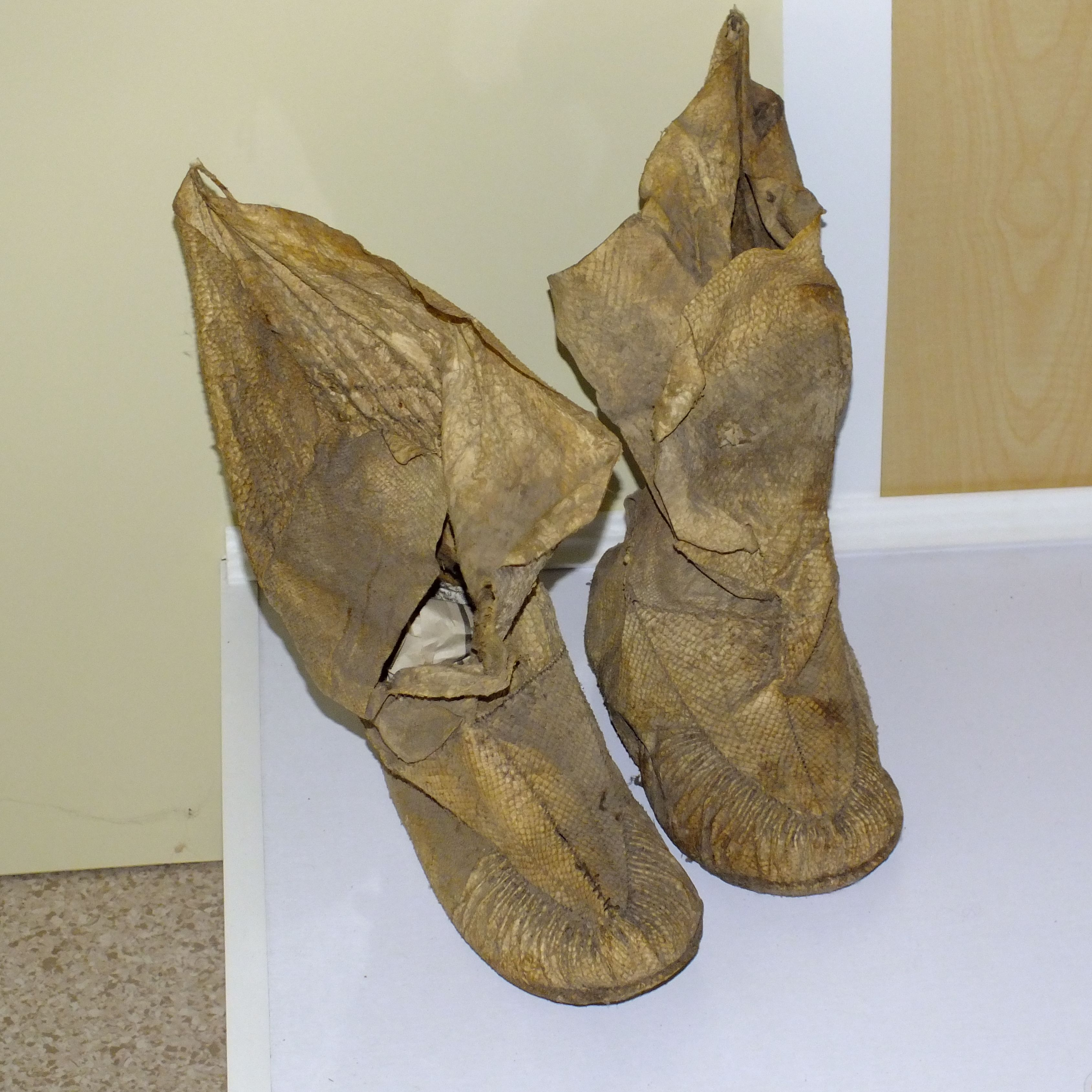 Sikachi-Alyan